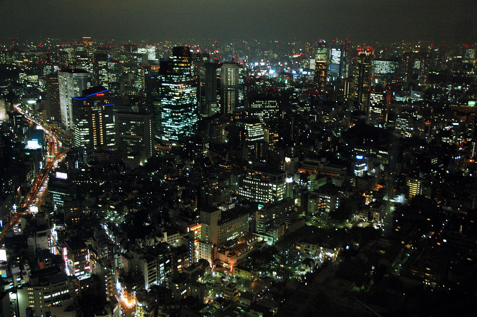 Tokyo Skyline #2